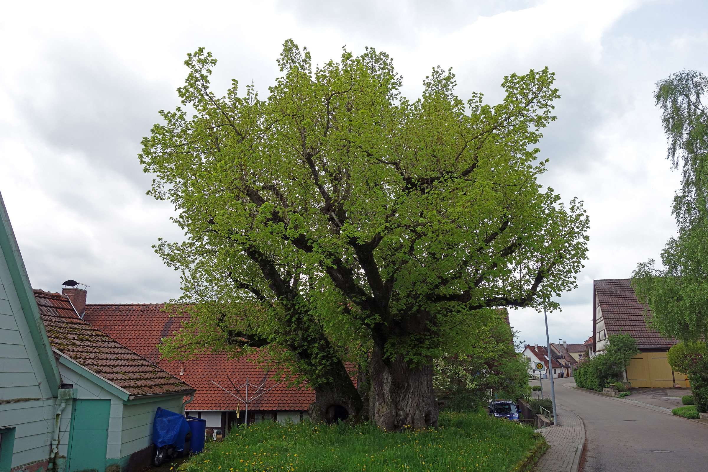 Linde Wiesenbach (Tilia platyphyllos), Naturdenkmal in Blaufelden